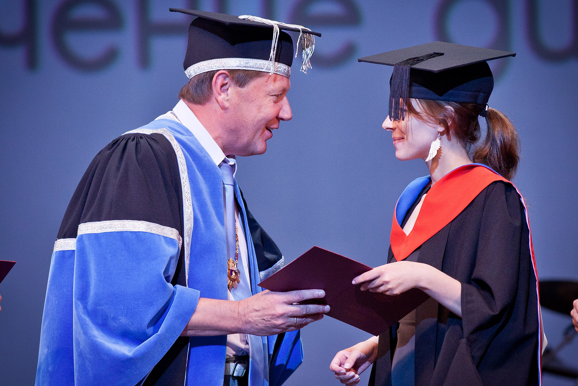 Ректор Университета ИТМО Владимир Васильев вручает диплом